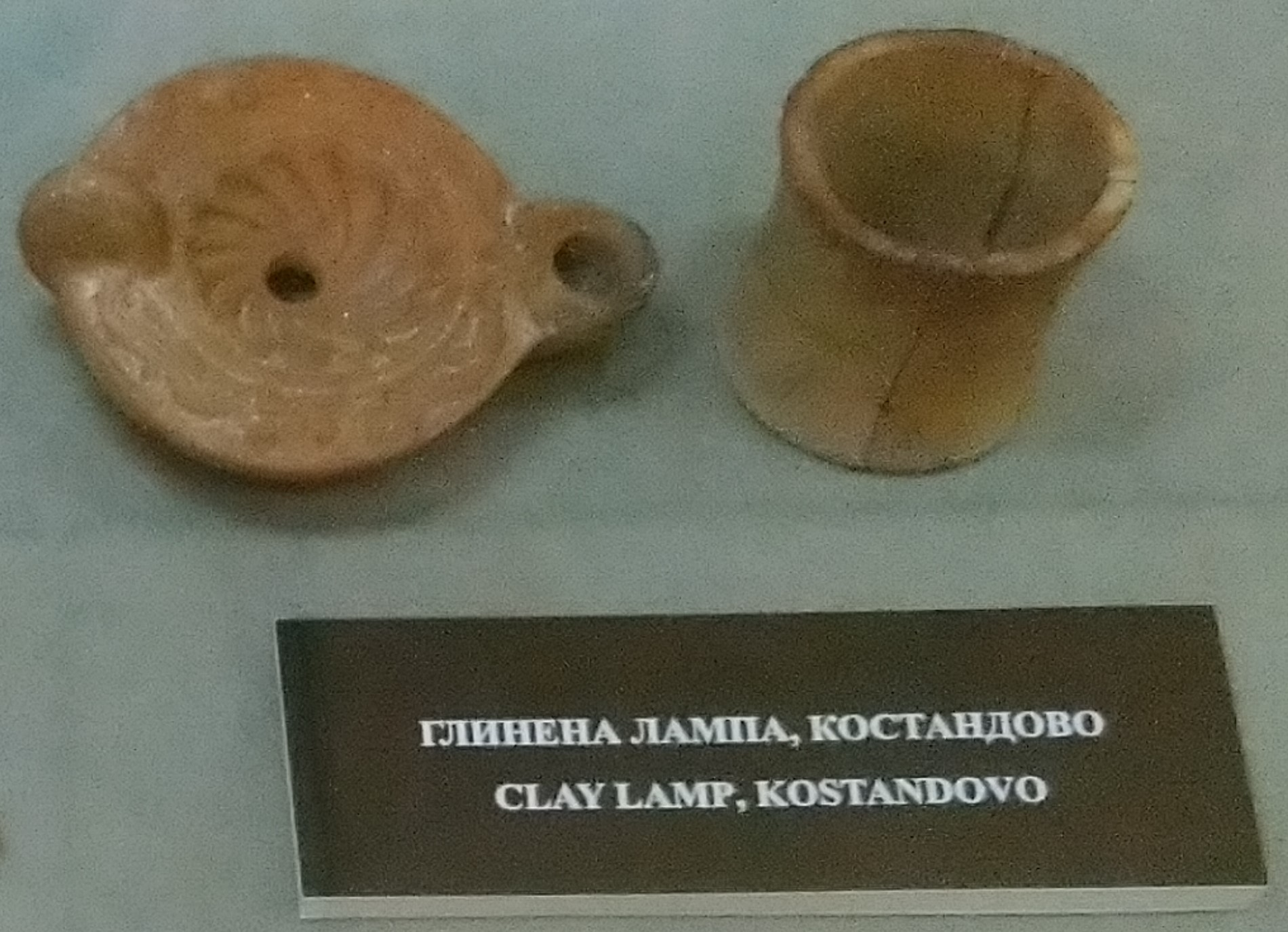 Исторически музей Пазарджик - Глинена лампа, Костандово